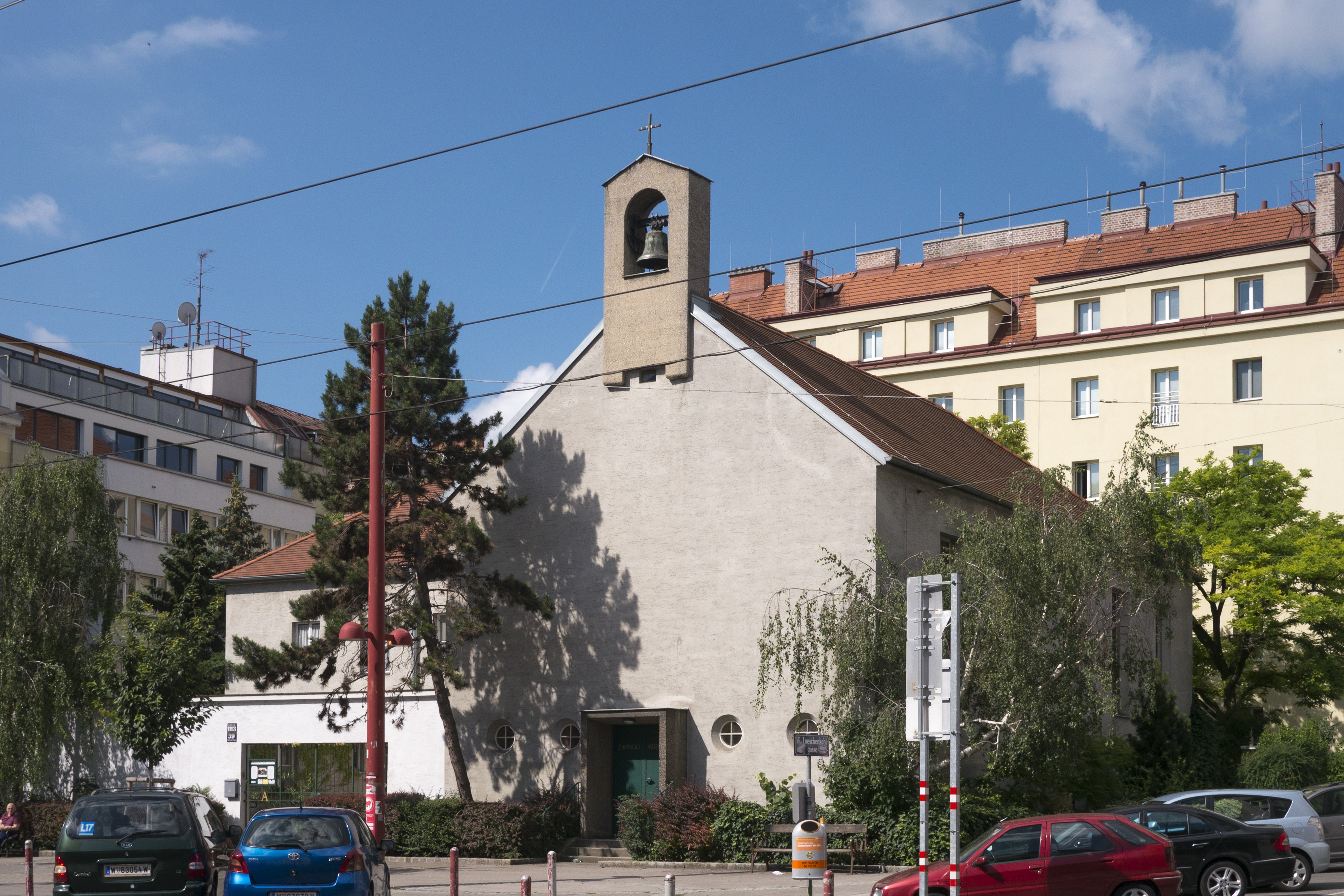 Evang. Pfarrkirche H.B., Zwingli-Kirche